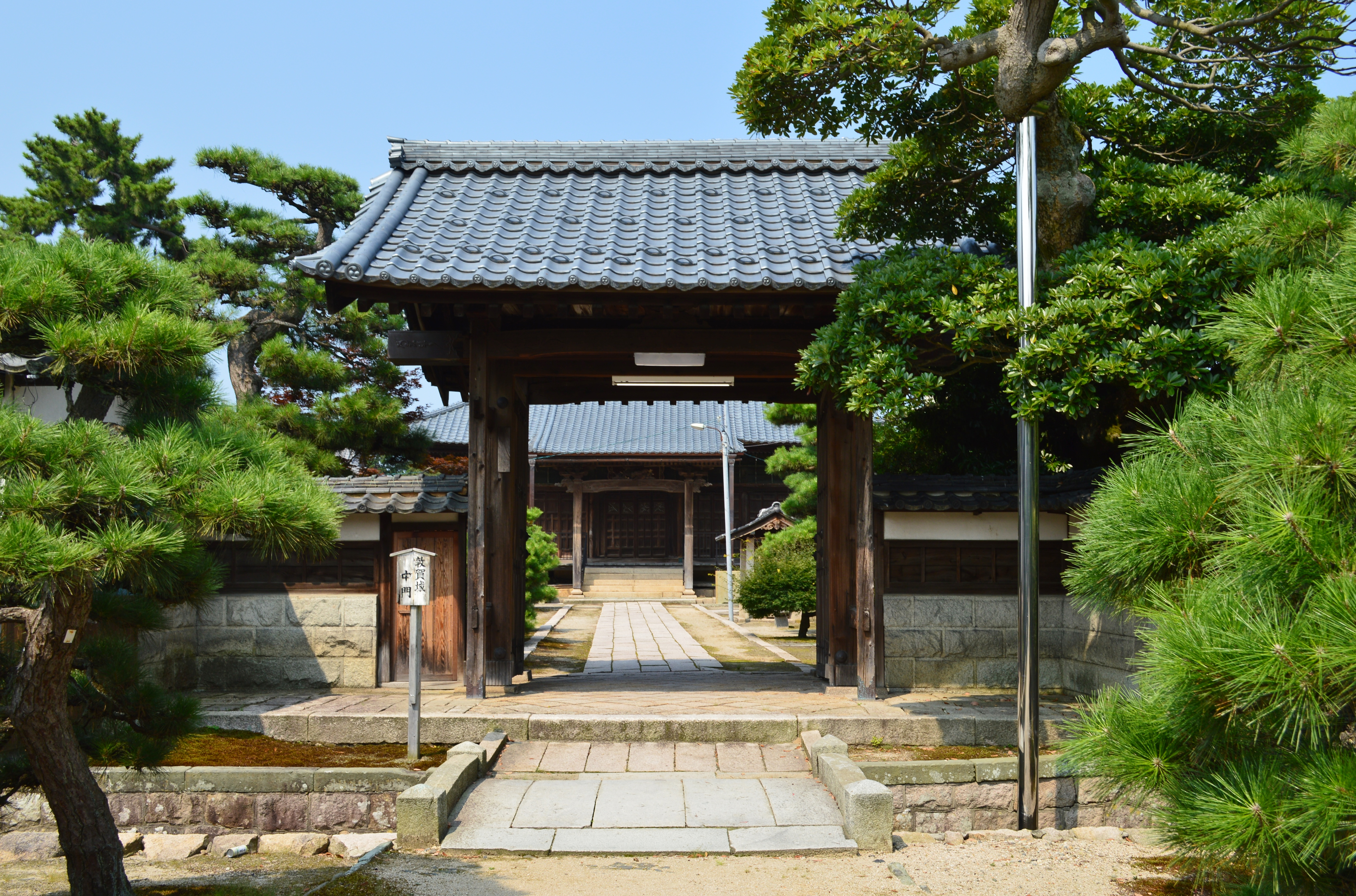 来迎寺 (敦賀市) 山門 (伝敦賀城中門)